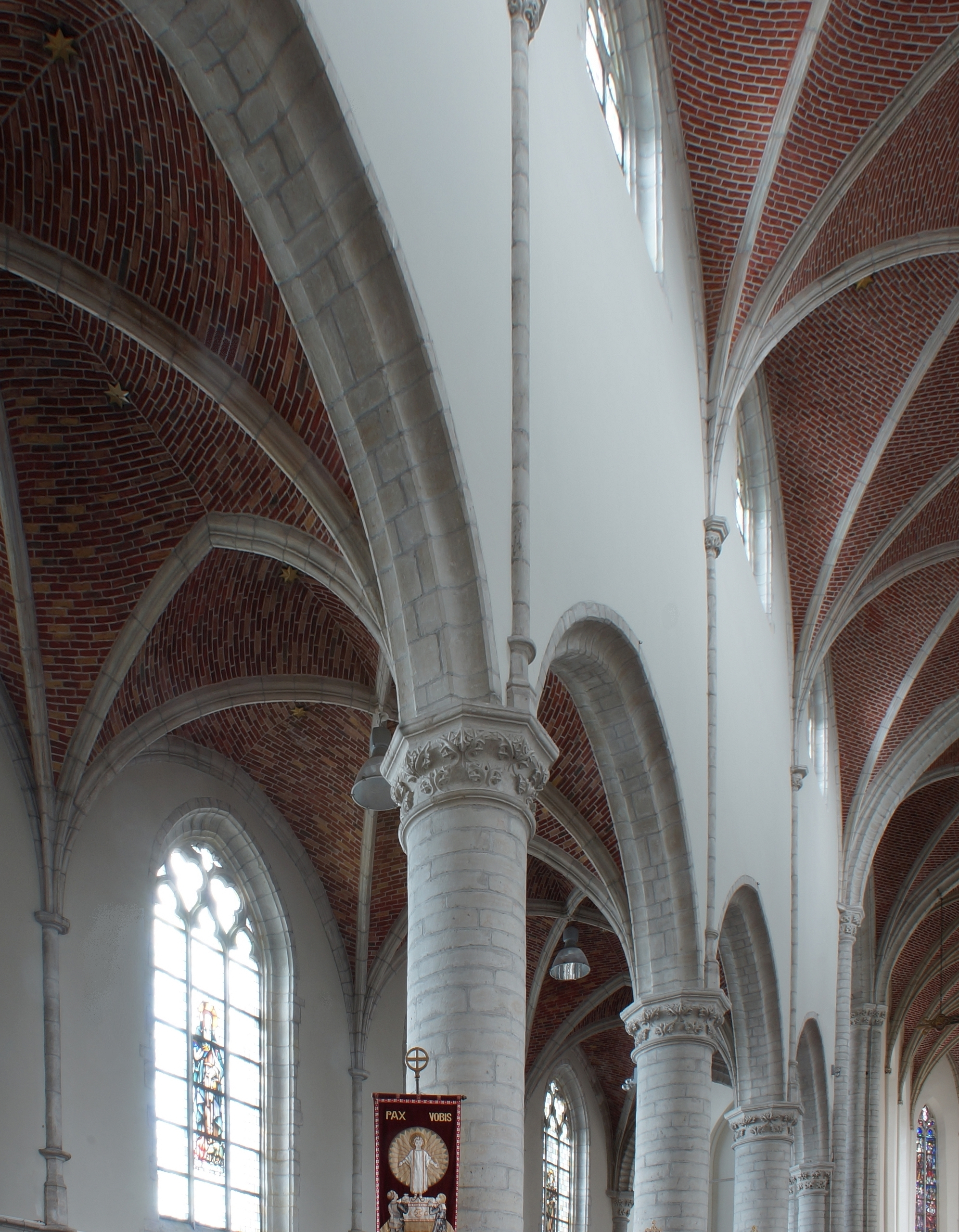 Sint-Leonarduskerk (Sint-Lenaarts). Pilaren en kapitelen.